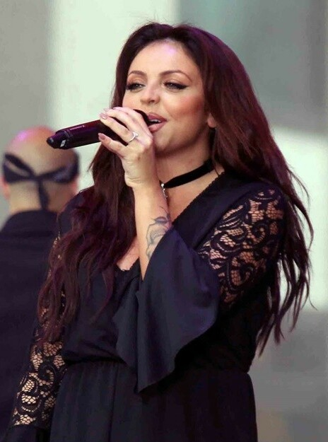 Little Mix perform live on NBC's 'Today' show Featuring: Jesy Nelson Where: New York, United States When: 19 Aug 2015 Credit: PNP/WENN.com